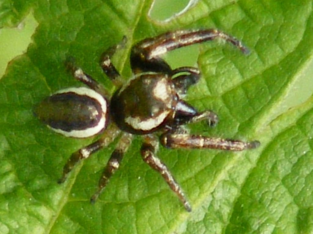 Eris militaris : Photographié dans la région montréalaise le 26 août 2010, sur Fujifilm FinePix S700.